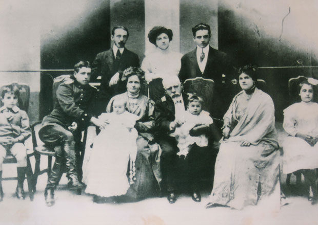 Familia del general Eloy Alfaro Delgado (presidente de Ecuador). Quito, 1910. Delante (izquierda a derecha): niño Paredes, coronel Olmedo Alfaro Paredes, Ana Paredes de Alfaro con uno de sus nietos, Eloy Alfaro Delgado con uno de sus nietos, Esmeralda Alfaro Paredes de Avilés, niña Paredes. Atrás (izquierda a derecha): Jerónimo Avilés, Colombia Alfaro Paredes de Huerta, Colón Eloy Alfaro Paredes.